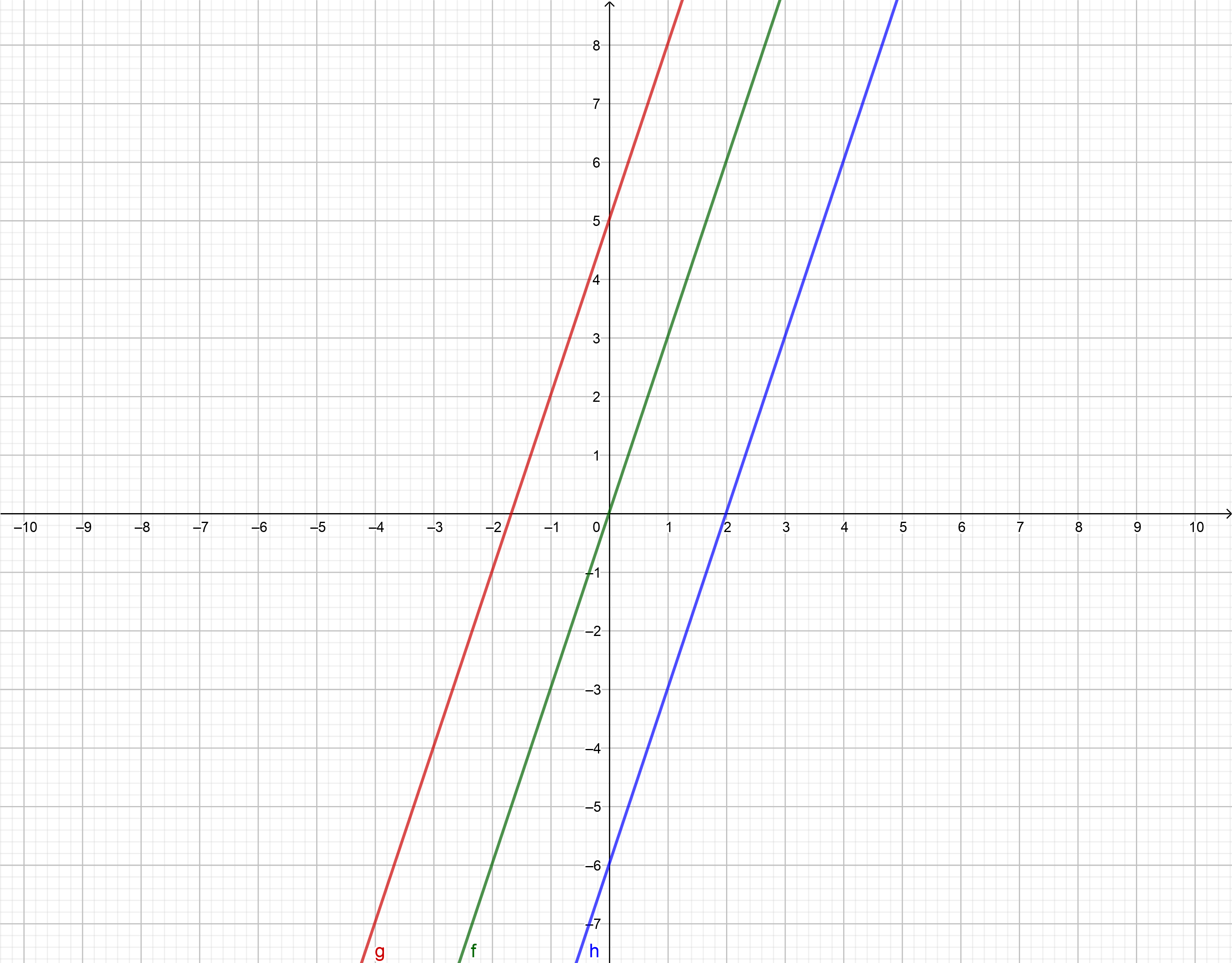 Azonos meredekségű, ezért párhuzamos, egymást nem metsző lineáris függvények grafikonjai. Az ábrát a GeoGebra programmal készítettem.